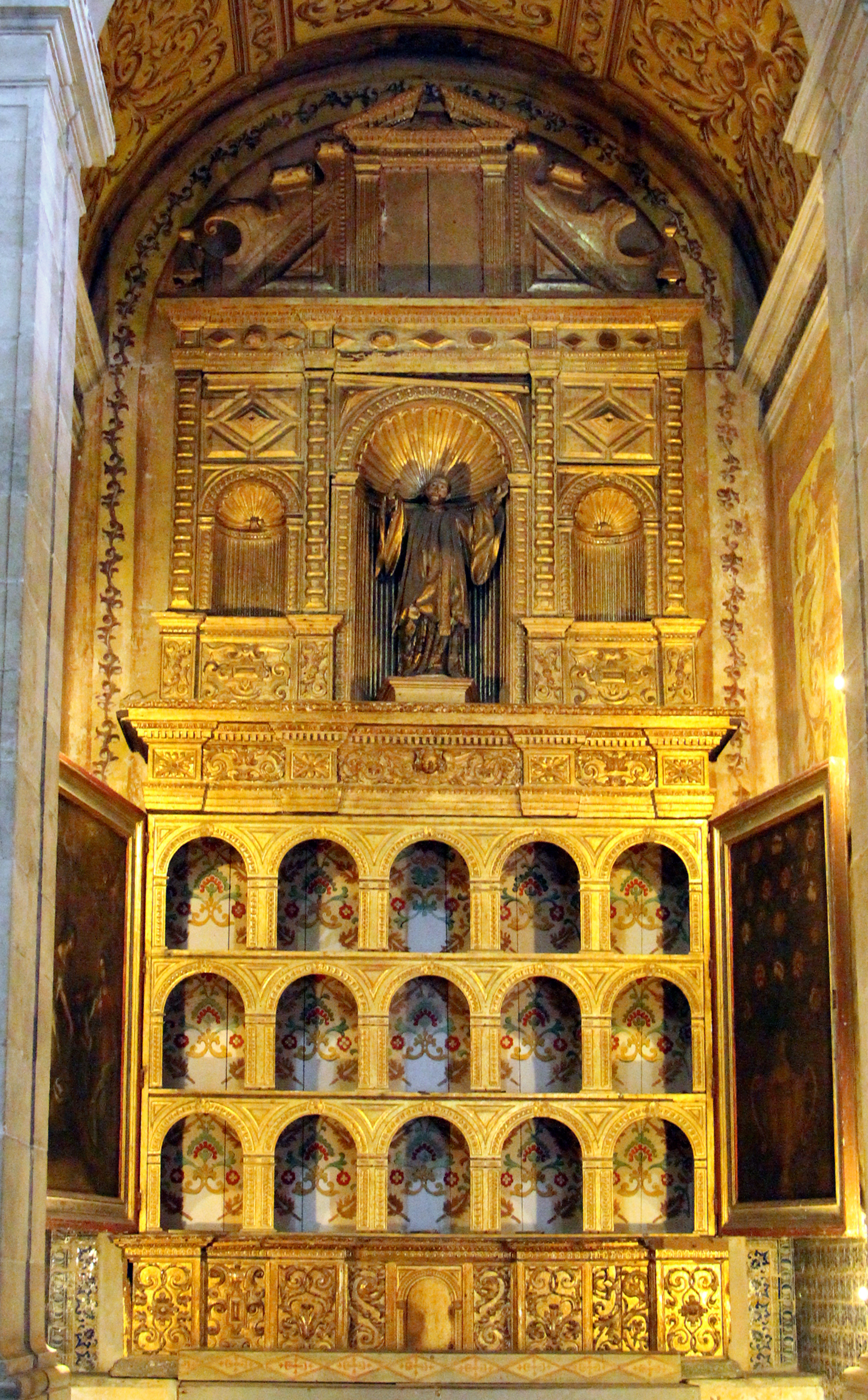 Detalhe de um altar lateral da Catedral de Salvador